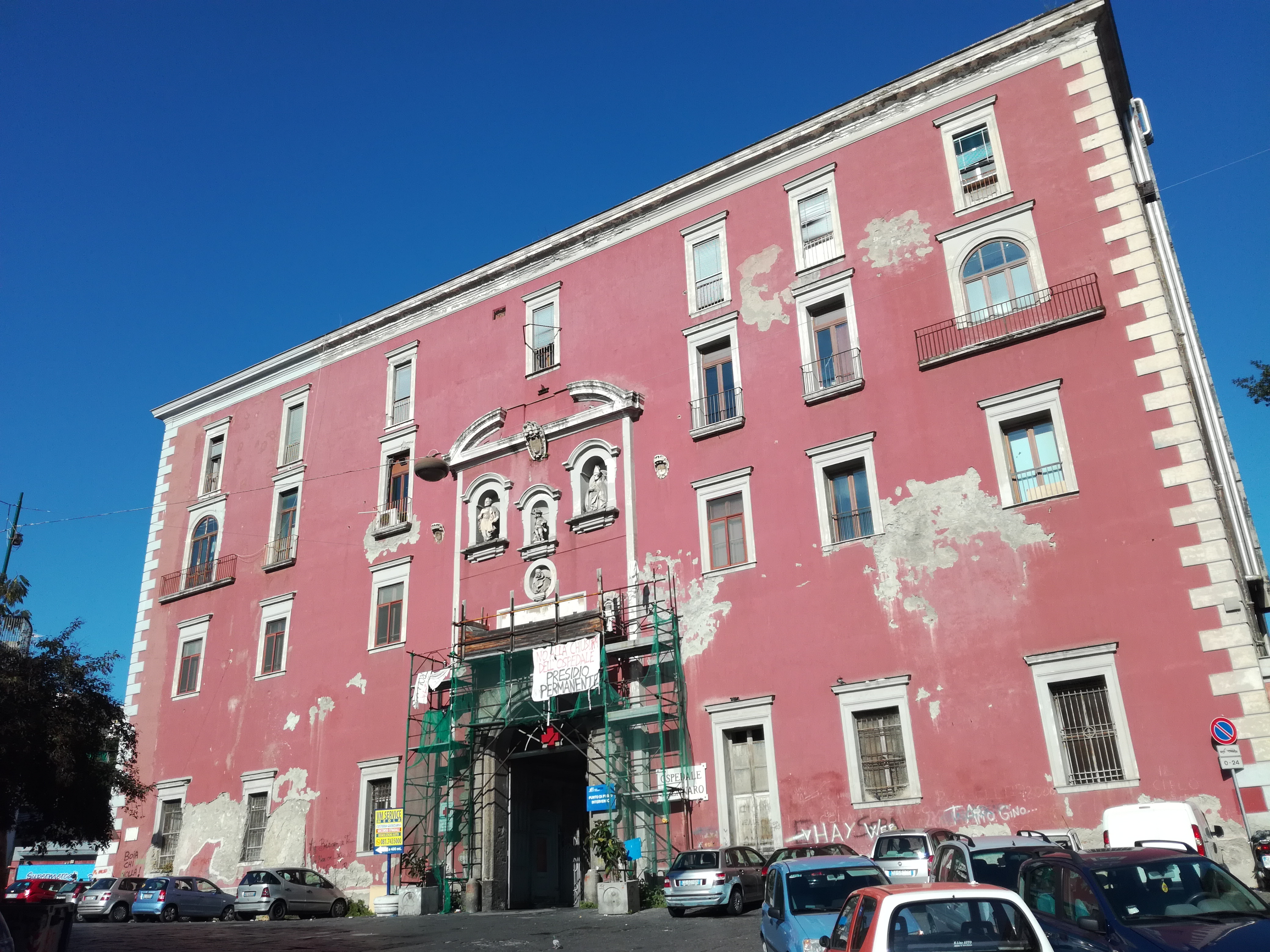 Ospedale San Gennaro dei Poveri